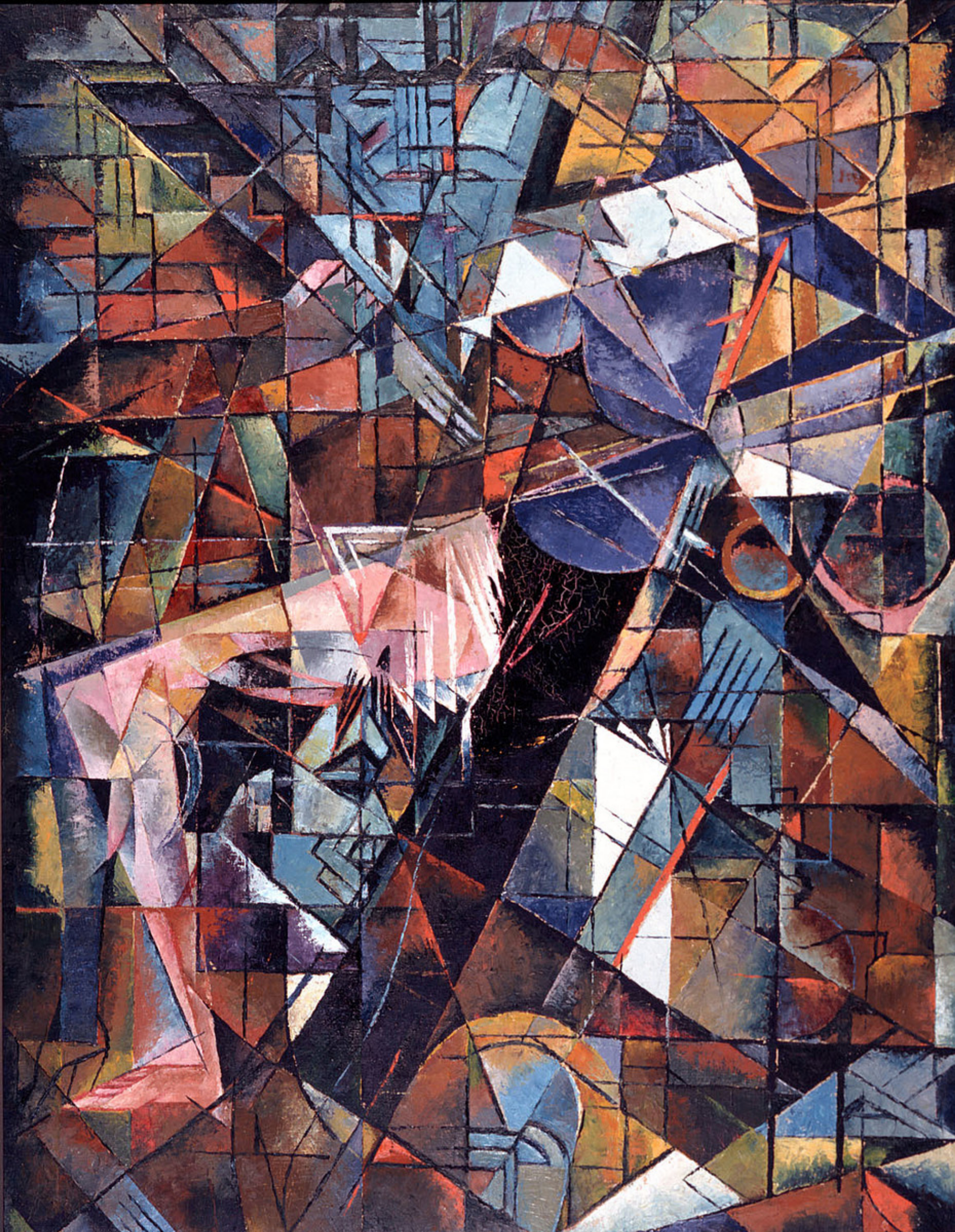 Fritz Stuckenberg, Das Liebespaar, (Bildnis Paul und Emmeke van Ostaijen), 1919, Landesmuseum für Kunst und Kulturgeschichte, Inv.Nr. 12.289